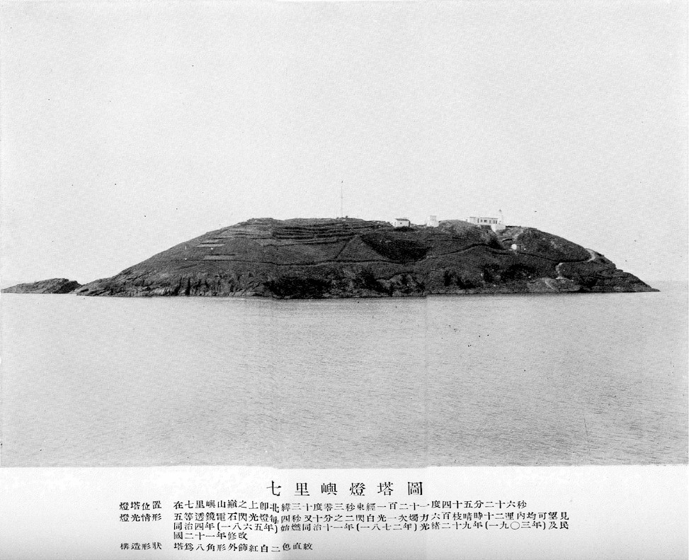 七里屿灯塔（20世纪30年代）